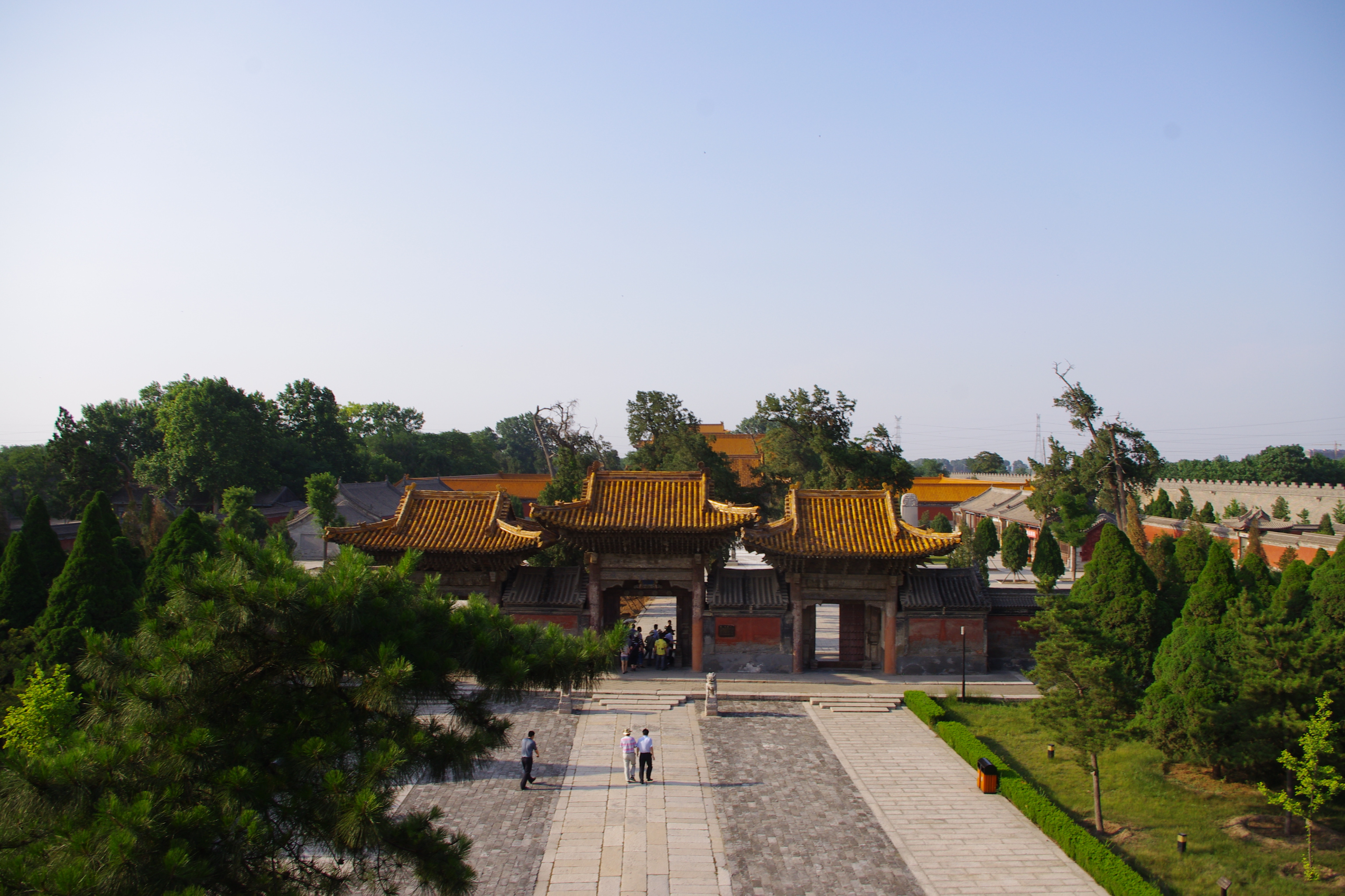 陕西渭南西岳庙